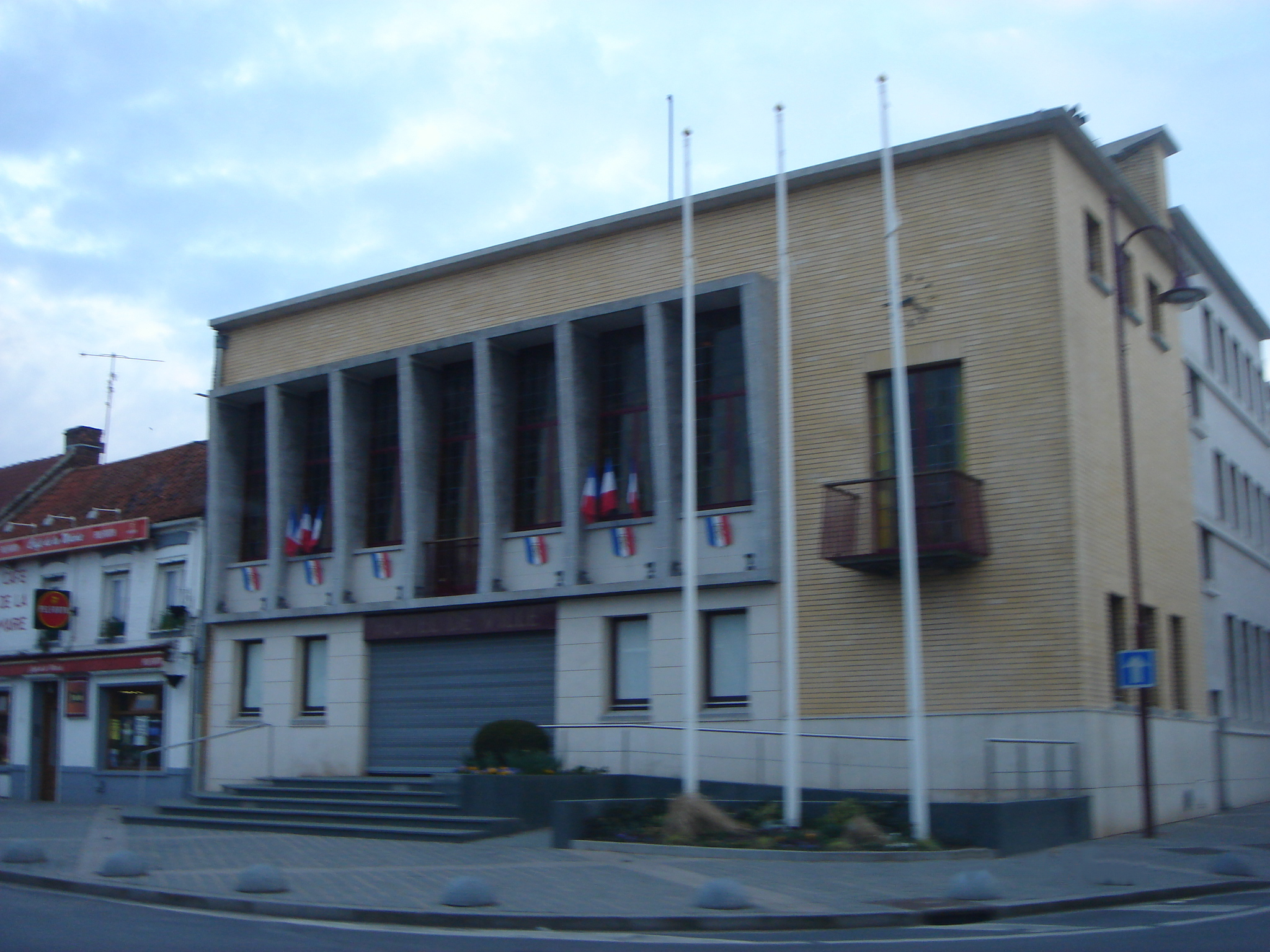 Pecquencourt - Hôtel de ville